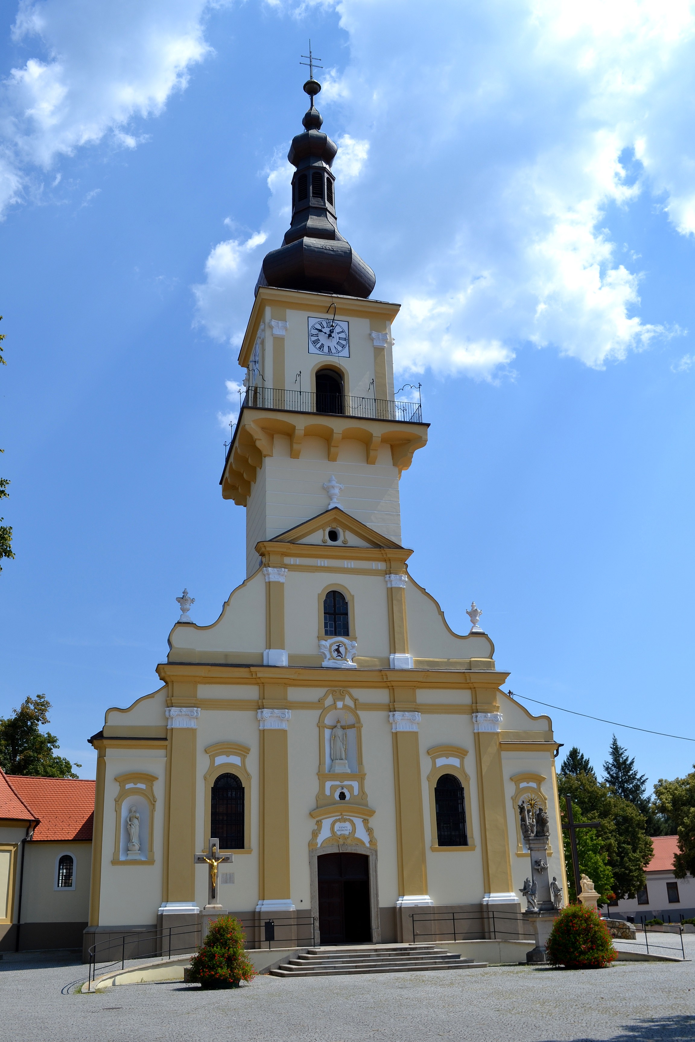 Stupava (okr. Malacky), Kostol svätého Štefana; hlavné priečelie